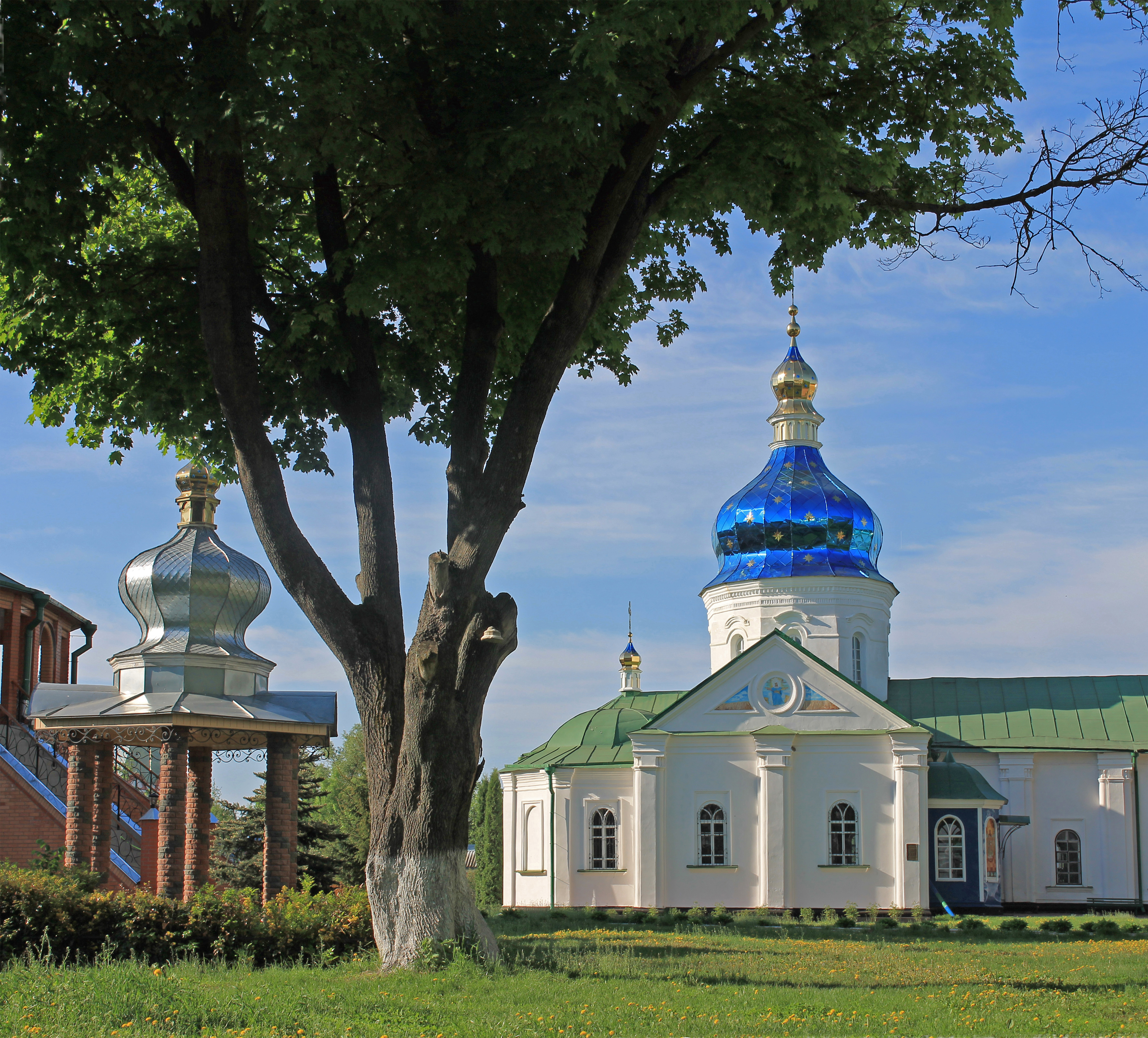 Воскресенська трапезна церква 1695-1844рр., Густинського монастиря, с.Густиня, Прилуцький р-н., Чернігівська обл.